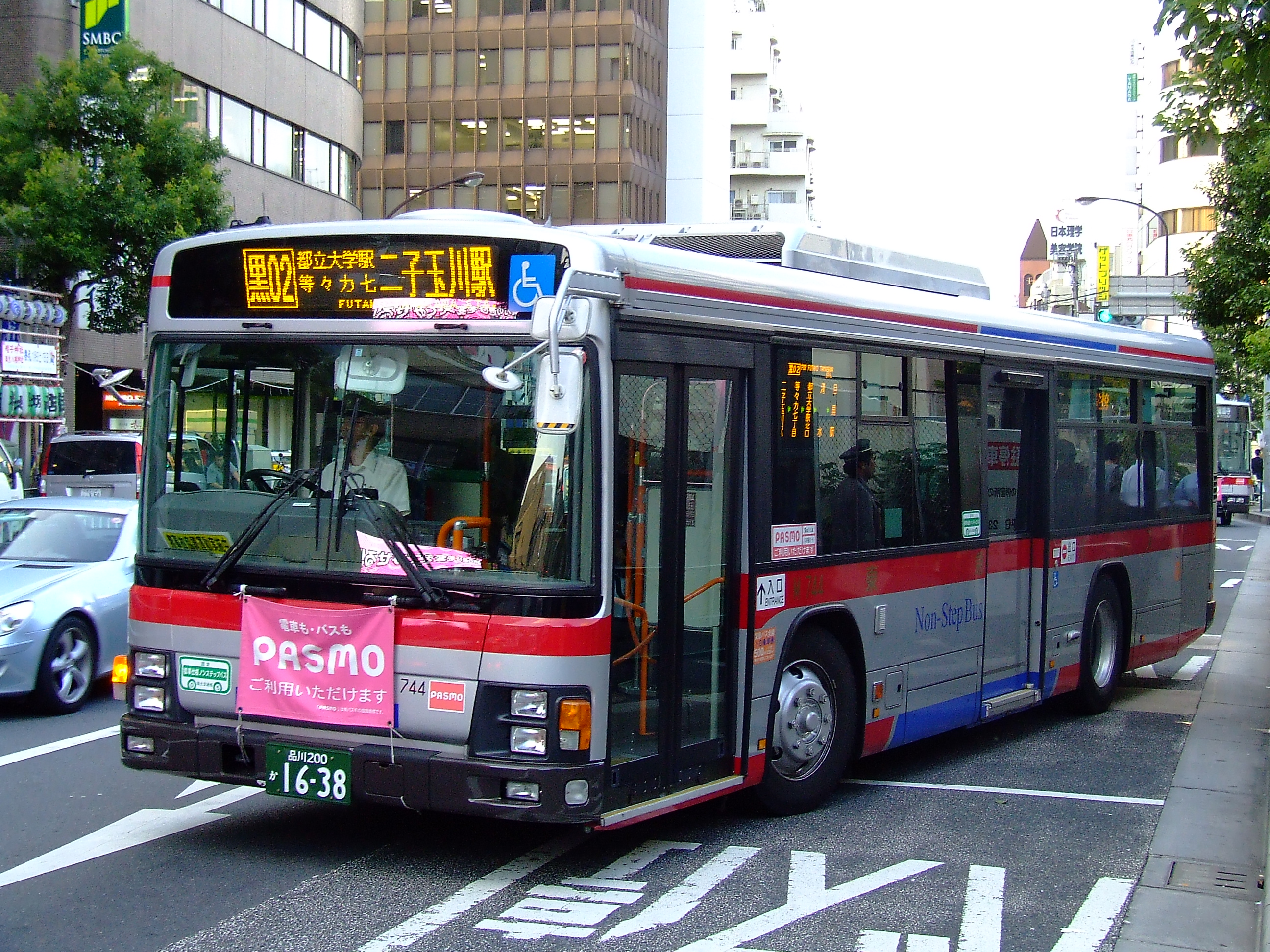 東急バス目黒営業所M744号車 目黒駅にて